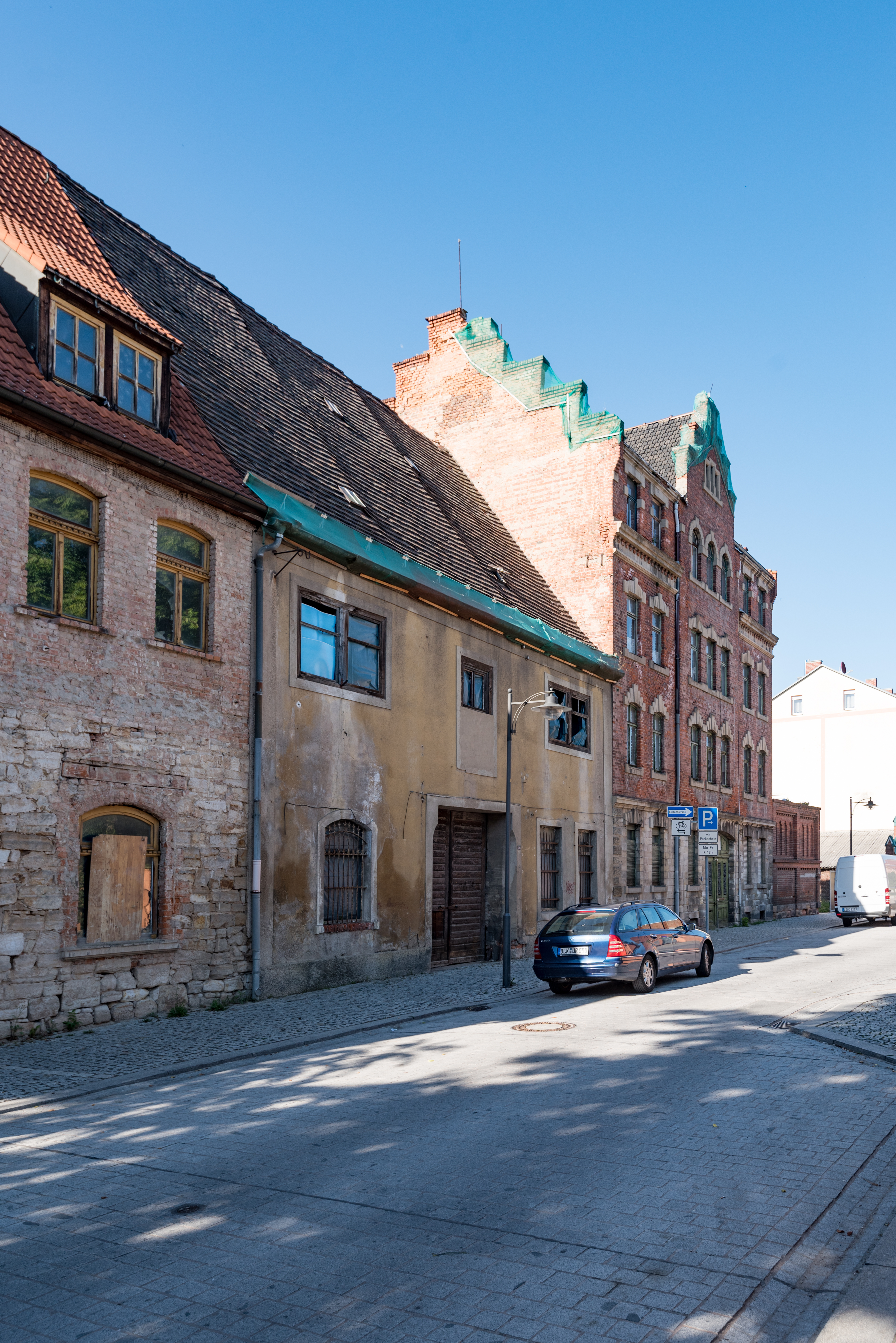 Weißenfels, Große Kalandstraße 29, 27